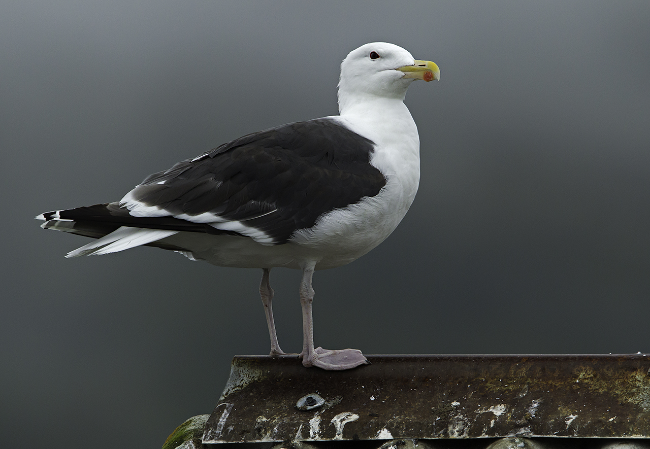 Svartbak (Larus marinus) er en kystbunden overflatebeitende sjøfugl som tilhører gruppen måker. Foto: Per Harald Olsen